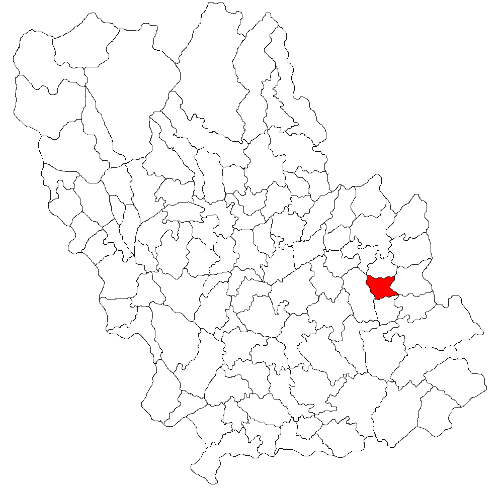 Categorie:Hărţi ale judeţului Prahova